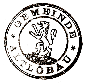 Siegel der ehemaligen Gemeinde Altlöbau